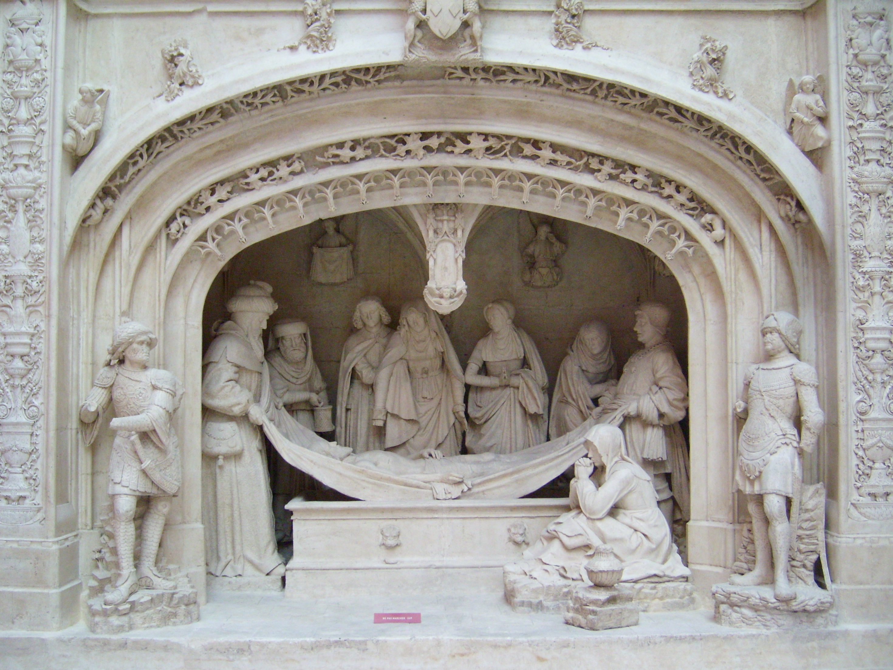 Galerie des Moulages, Musée des Monuments français, Paris Mise au tombeau du Christ (1496), église abbatiale Saint-Pierre de Solesmes (Sarthe, France), attribué à l'atelier de Michel Colombe (~1430- ~1513) Moulage d'Edouard Pouzadoux (~1893)